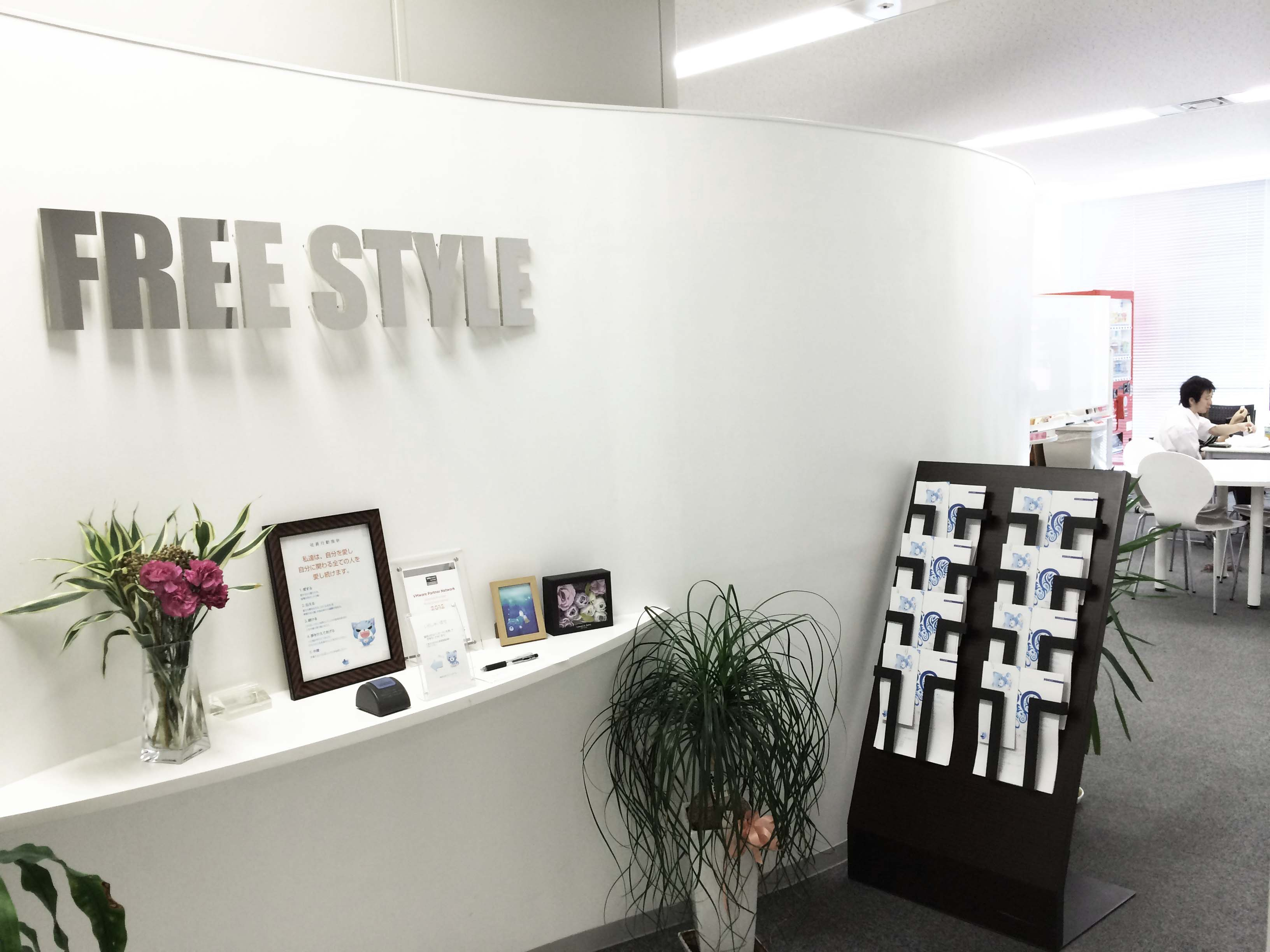 株式会社フリースタイル本社